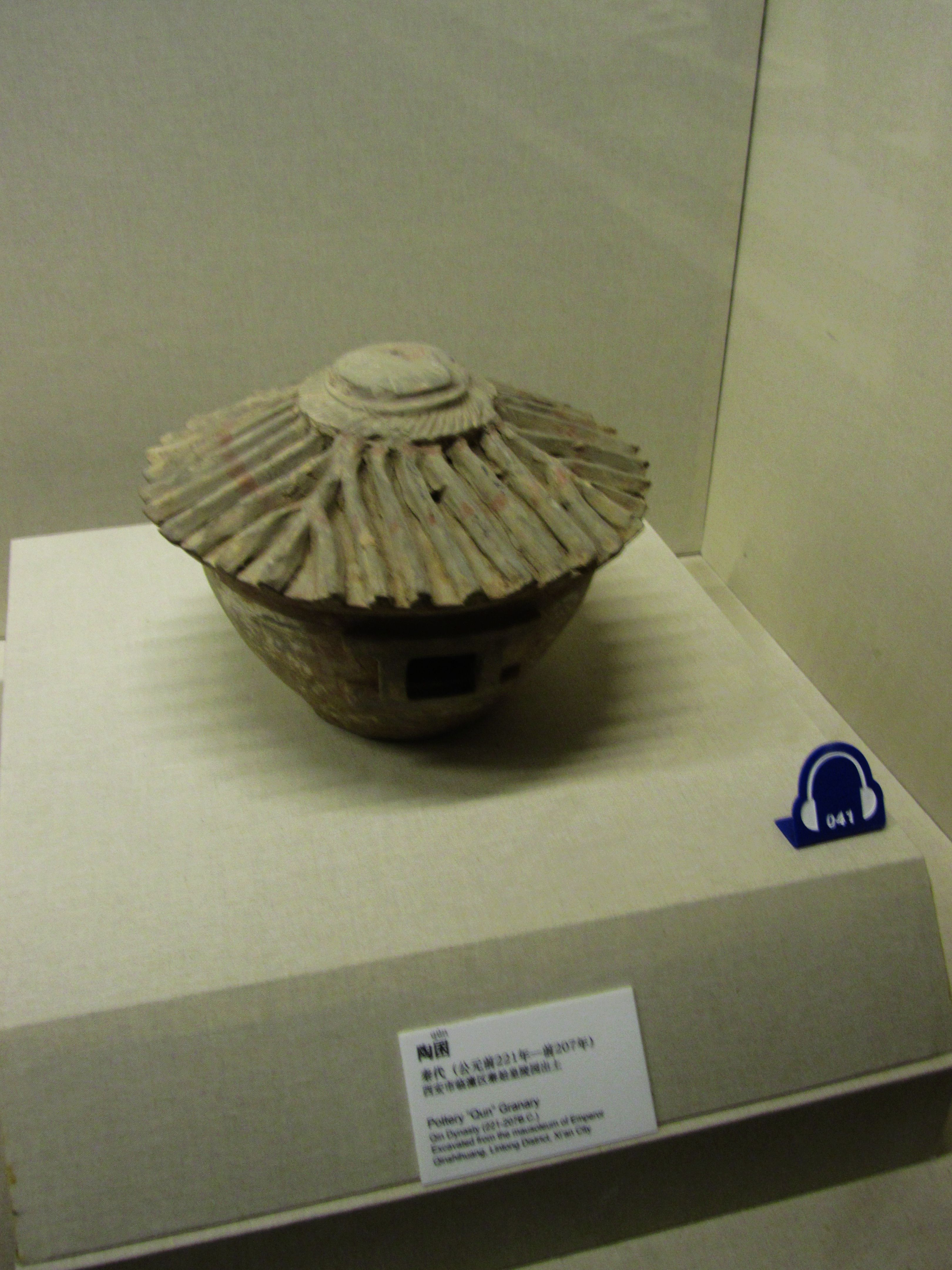 秦代陶囷模型，秦始皇陵园出土，现藏陕西历史博物馆。